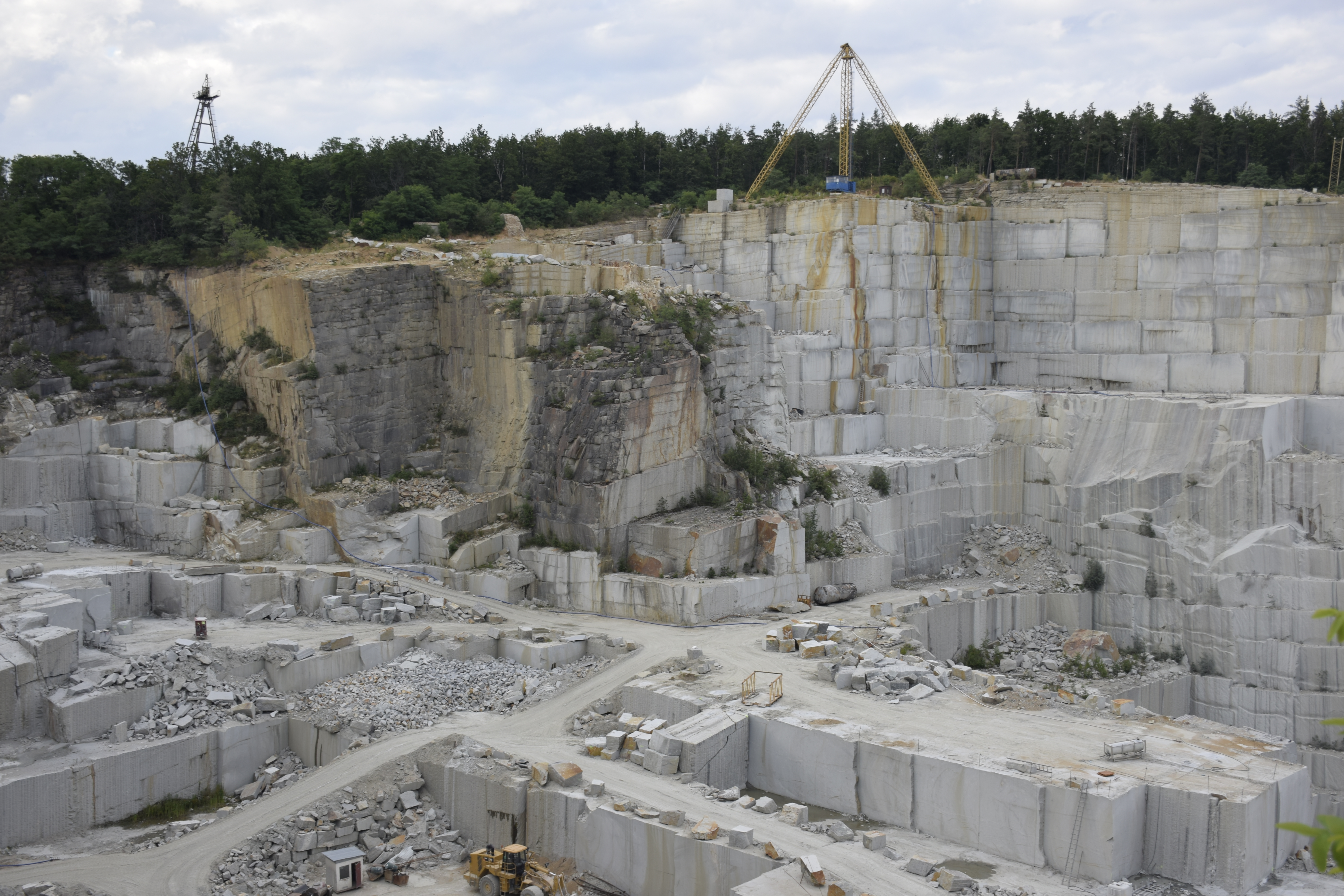 Borów (powiat świdnicki). Polska.